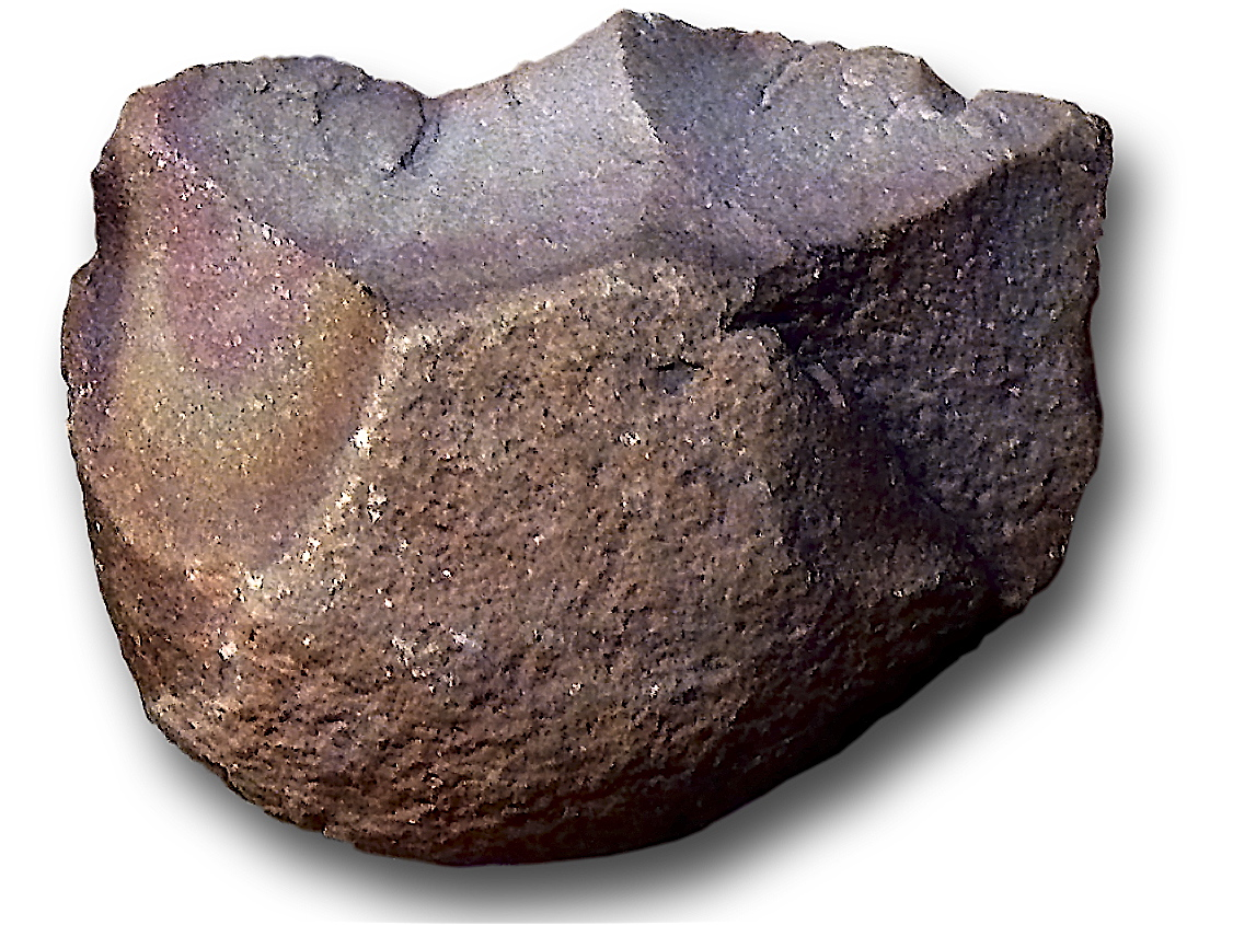 Canto tallado de tradición Olduvayense procedente de la región del Sáhara atlántico Guelmim-Es Semara (Museo Arqueológico Nacional de Madrid)